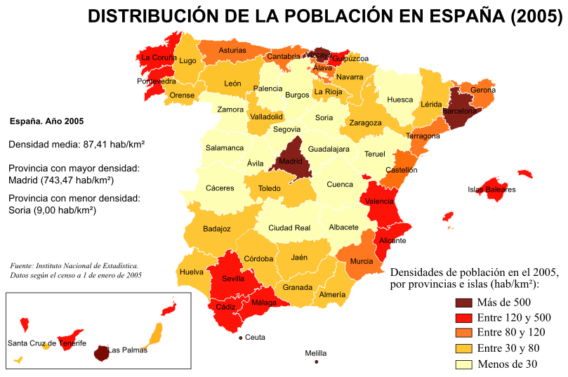 Mapa de España con las densidades de población por provincias e islas, según el censo del Instituto Nacional de Estadística a 1 de enero de 2005.